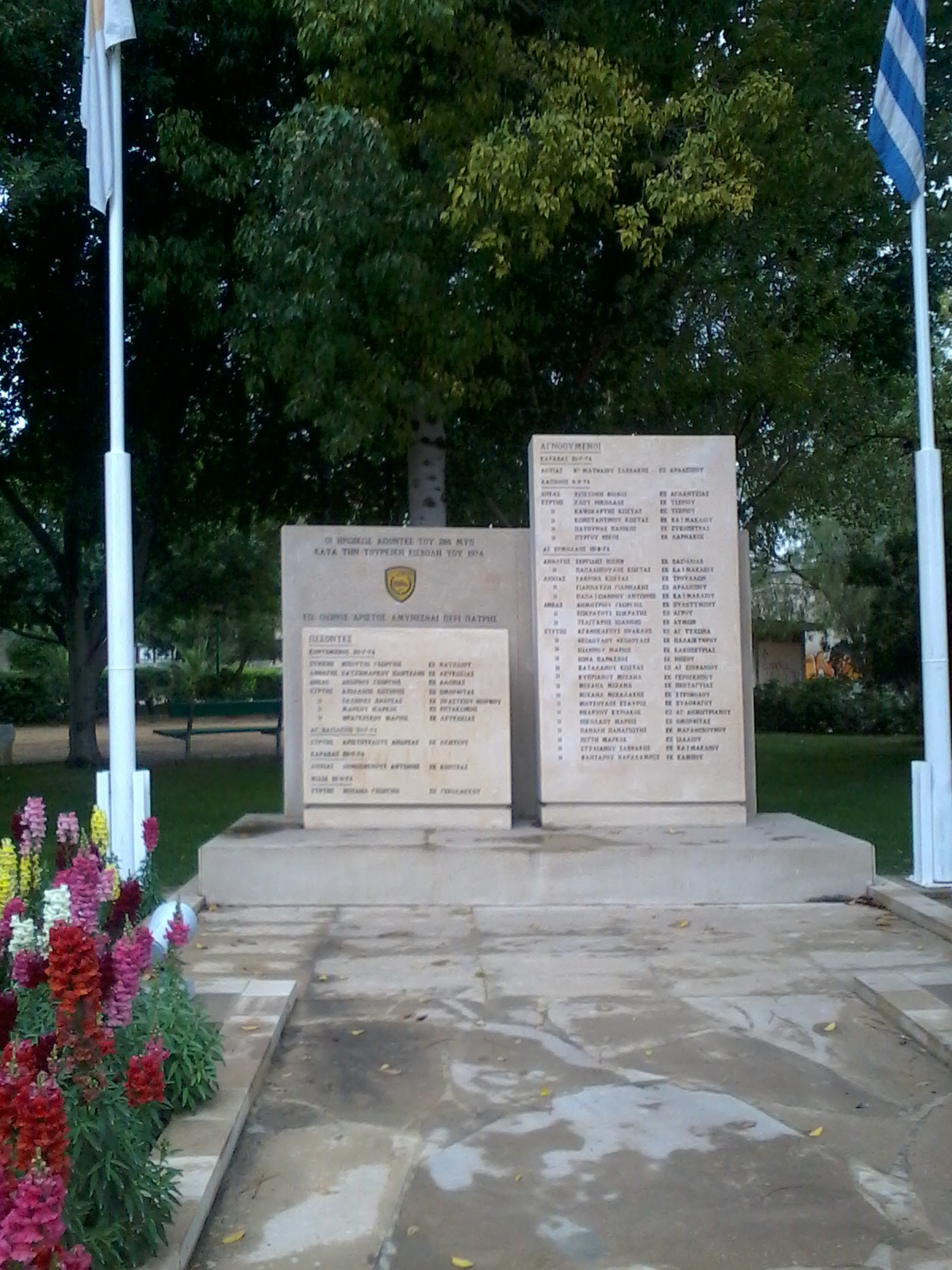 Μνημείο προς τιμήν των πεσόντων και αγνοουμένων του 286 Μ/Κ ΤΠ κατά την τουρκική εισβολή του 1974